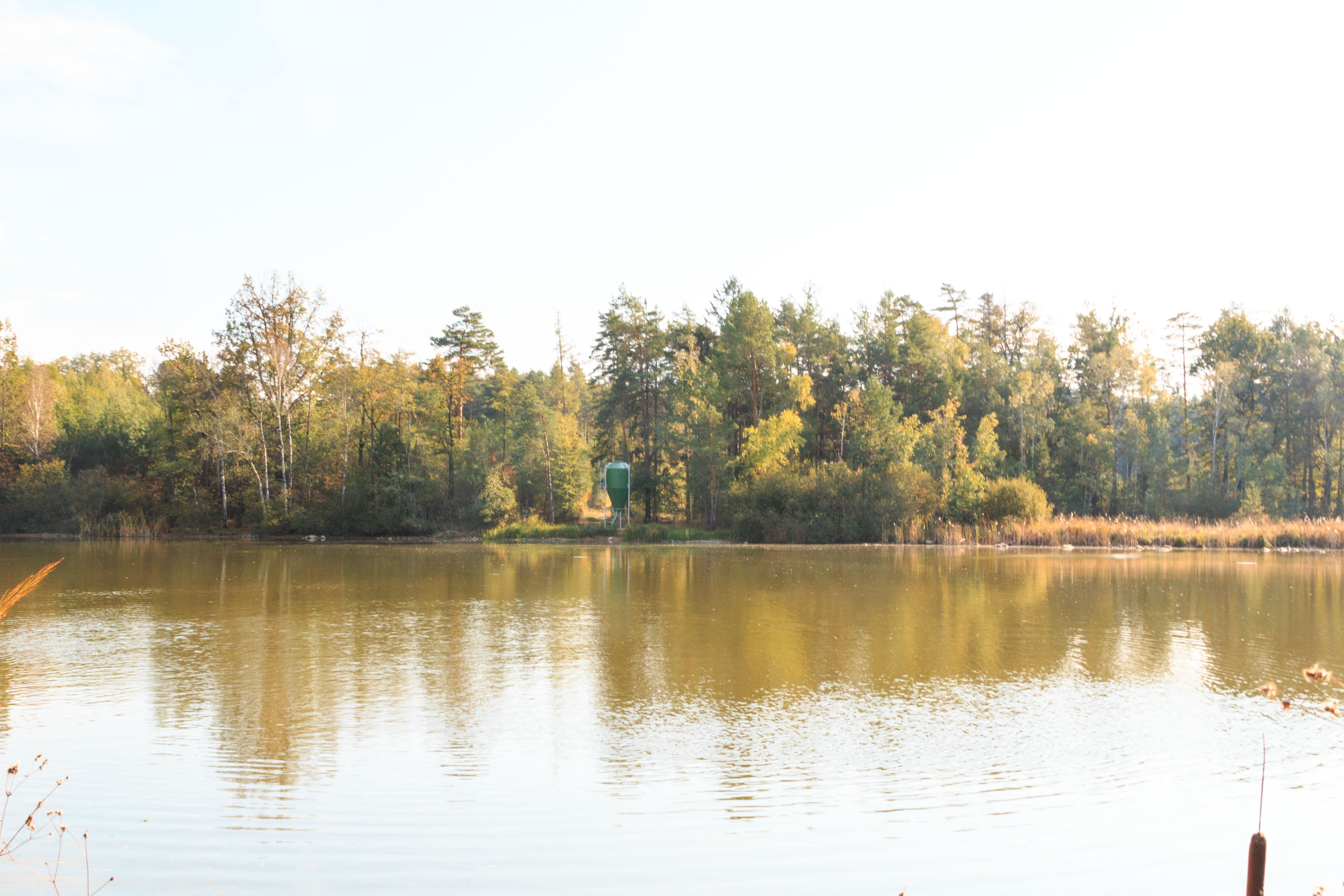 Rybník Zaháj Project: Vodstvo. Ticket: 1617.